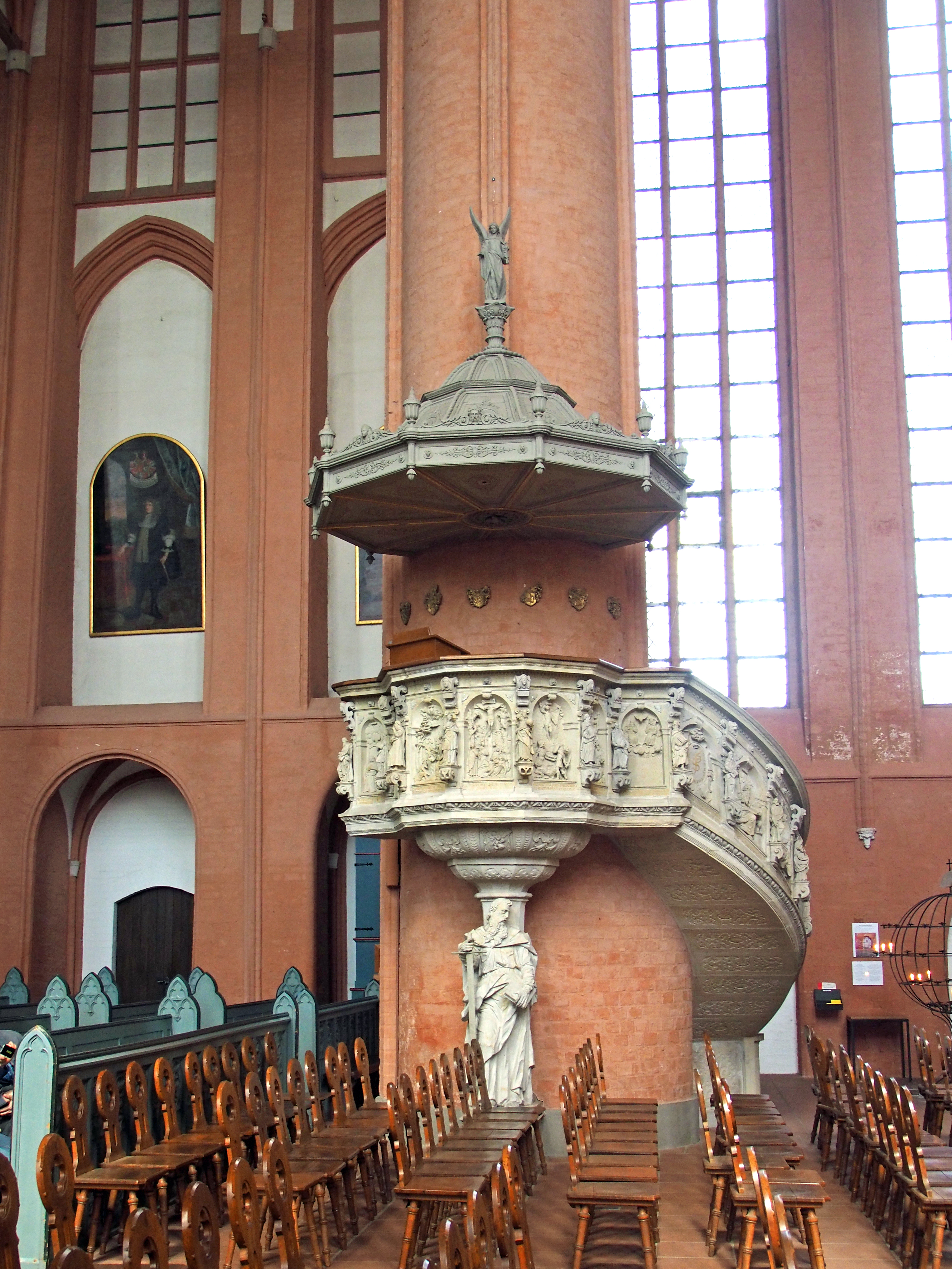 Kanzel in der St. Michaeliskirche, Lüneburg